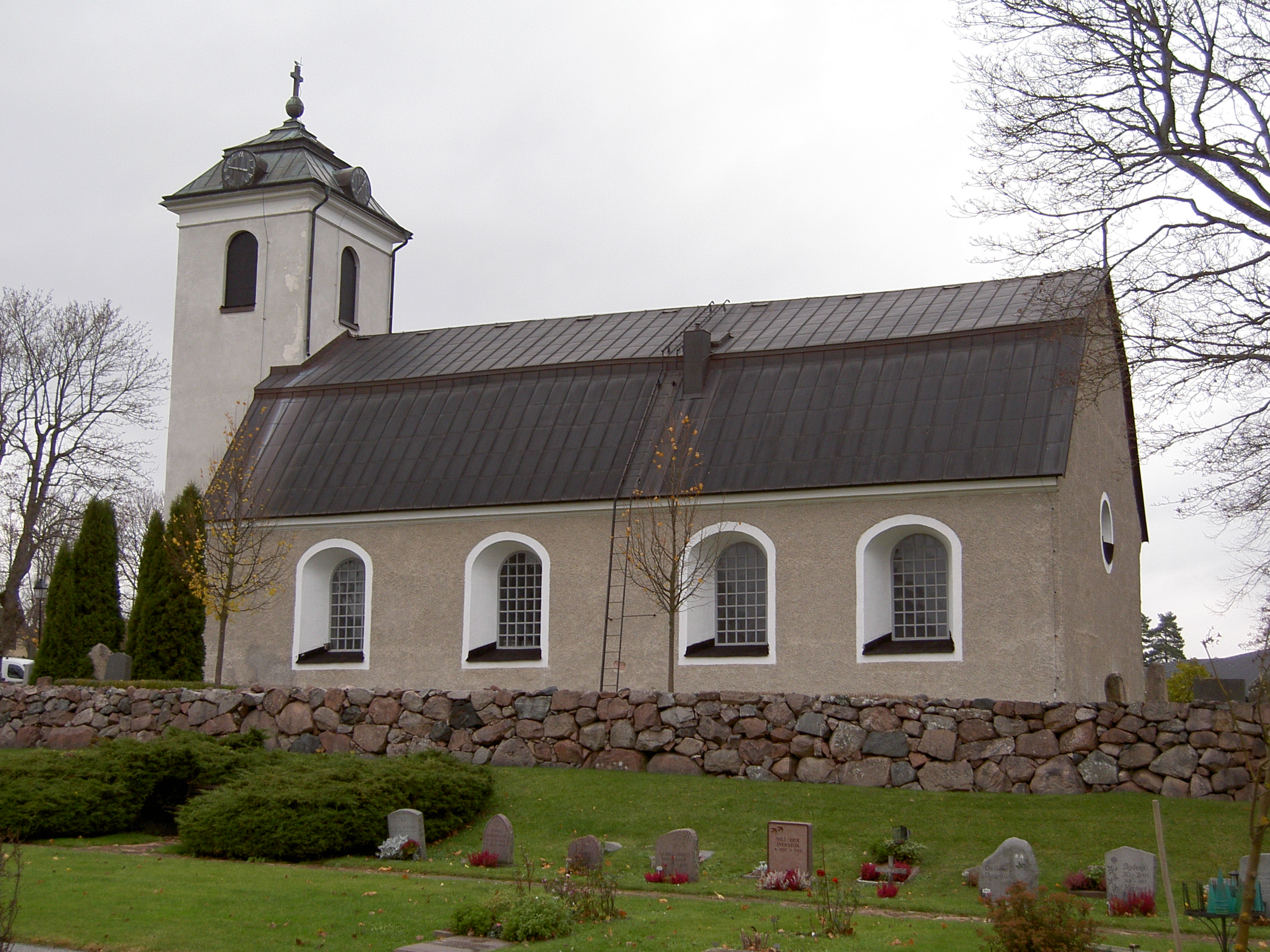 Fresta kyrka